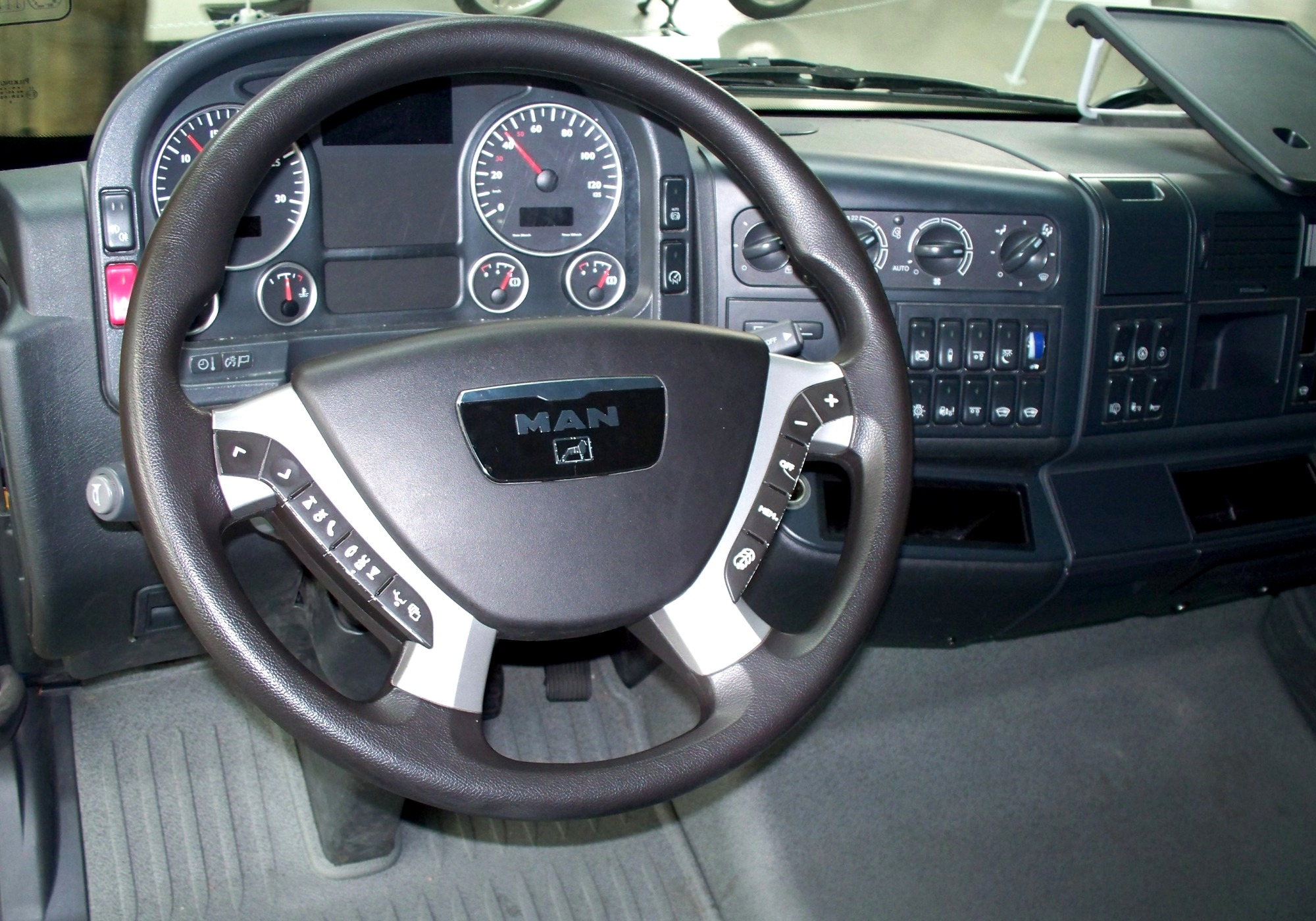 Lenkrad eines MAN D20 Common Rail LKW im Deutschen Museum - Verkehrszentrum.